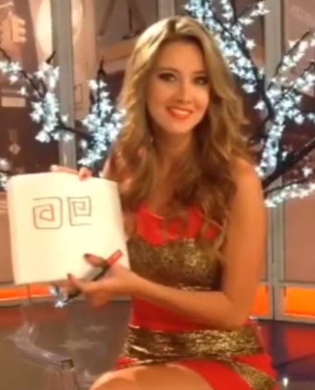 Daniella Álvarez en 2013